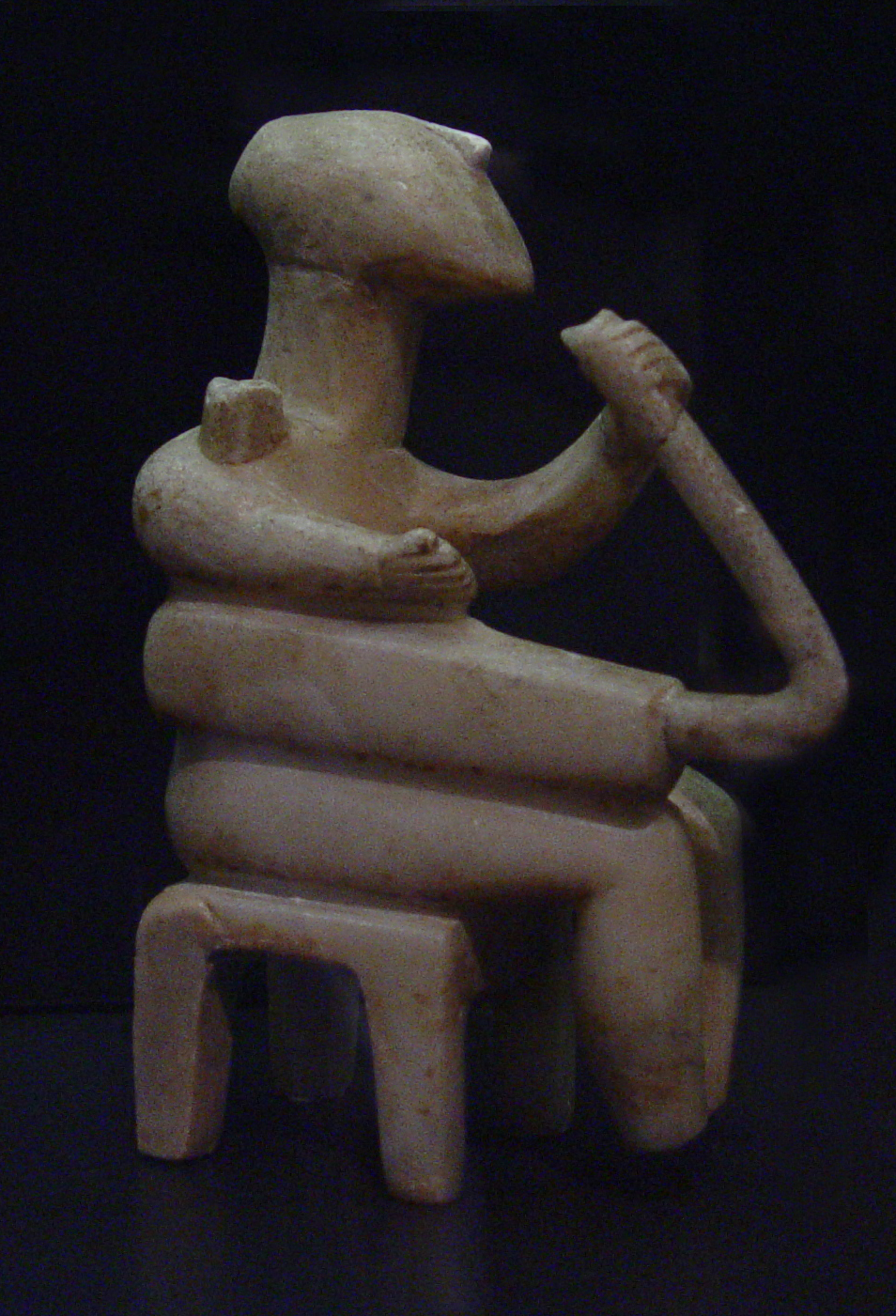 Harfenspieler Idol aus einem Grabfund auf der Insel Thera. Um 2700-2500 v. Chr. Marmor aus der Kykladen Kultur.